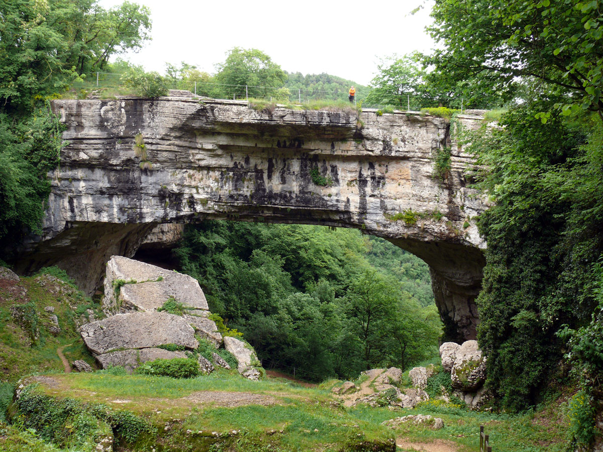 Ponte di Veia